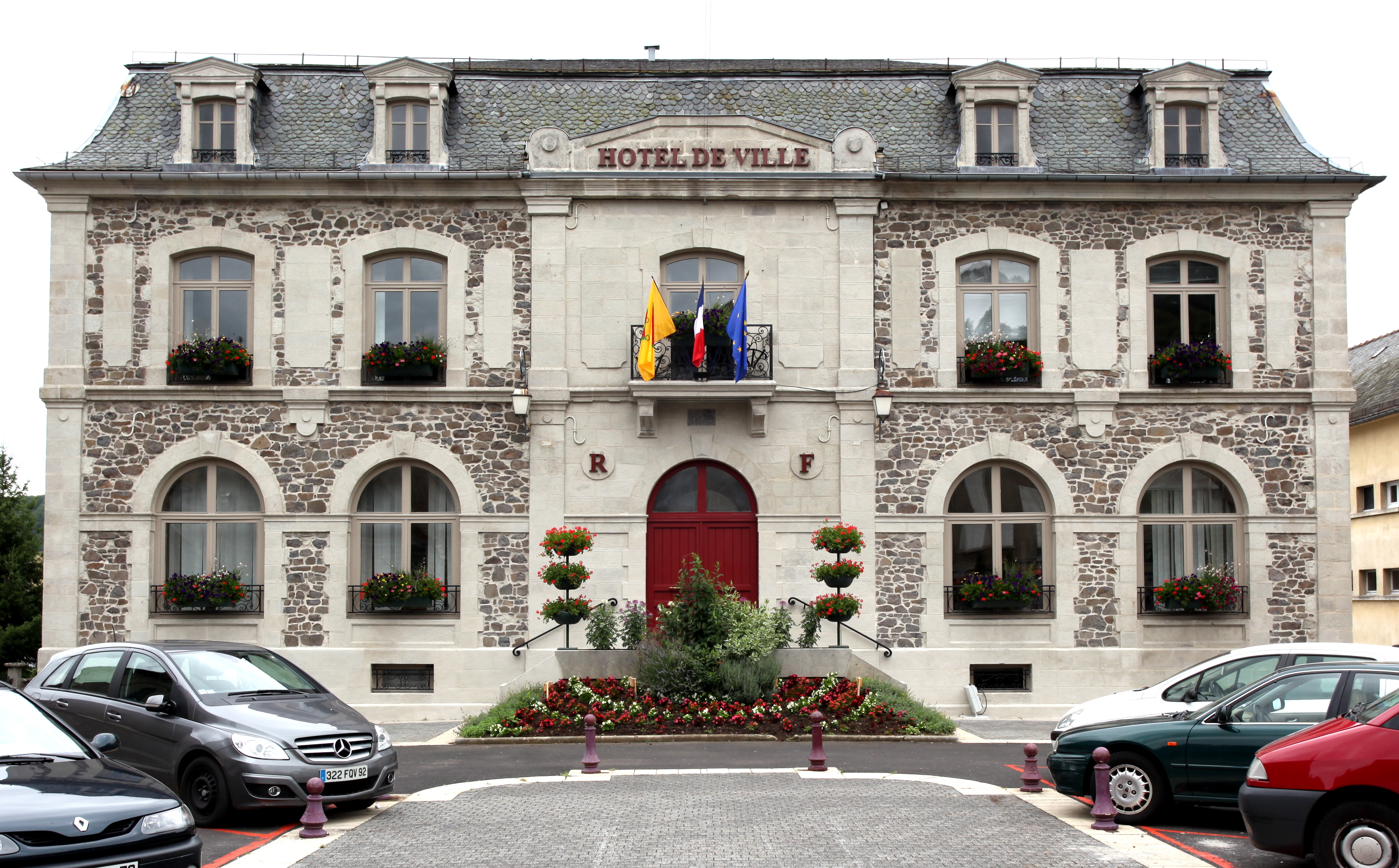 Hotel de ville de Riom-ès-Montagnes, Cantal, France.